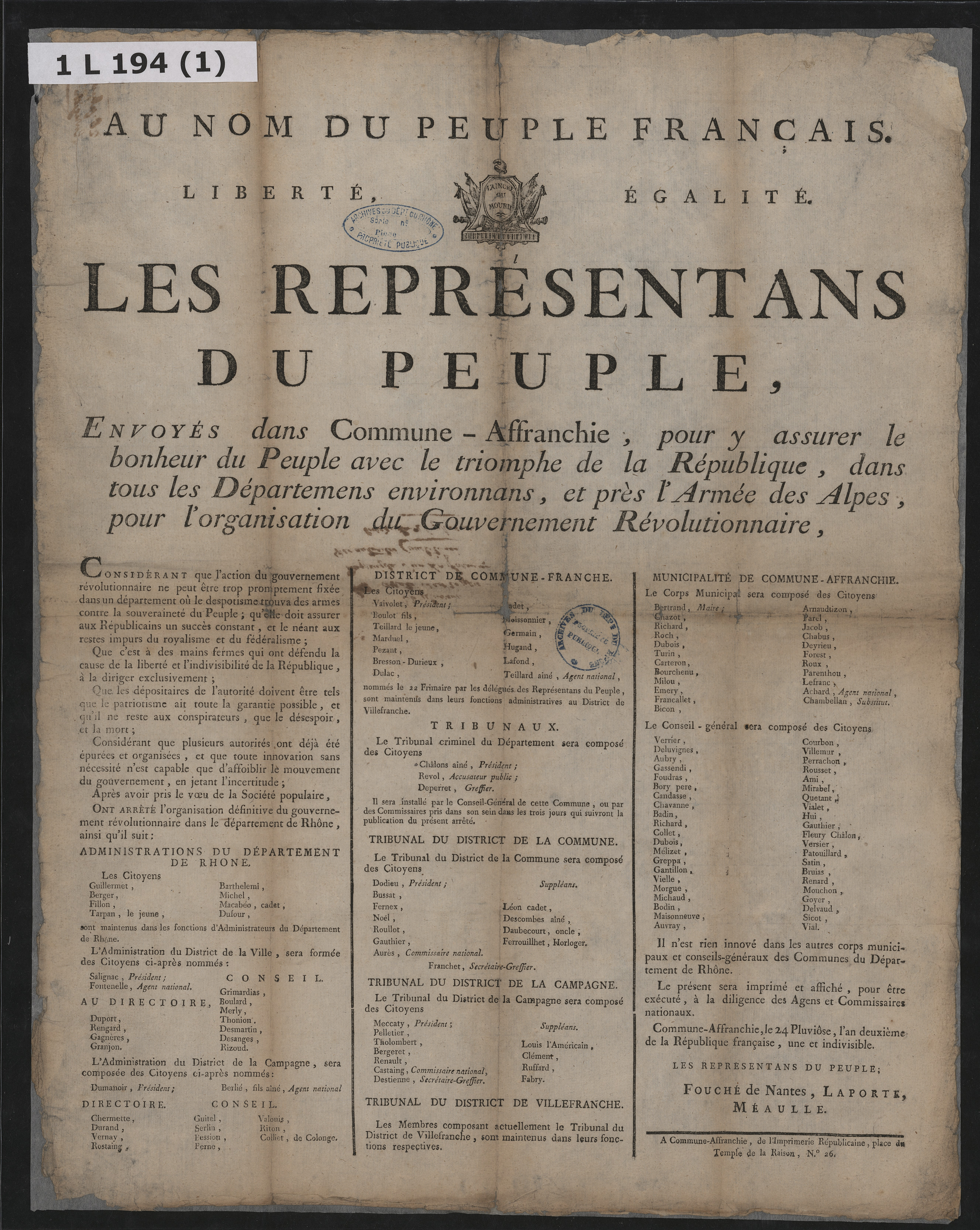 ADRML - 1 L 194